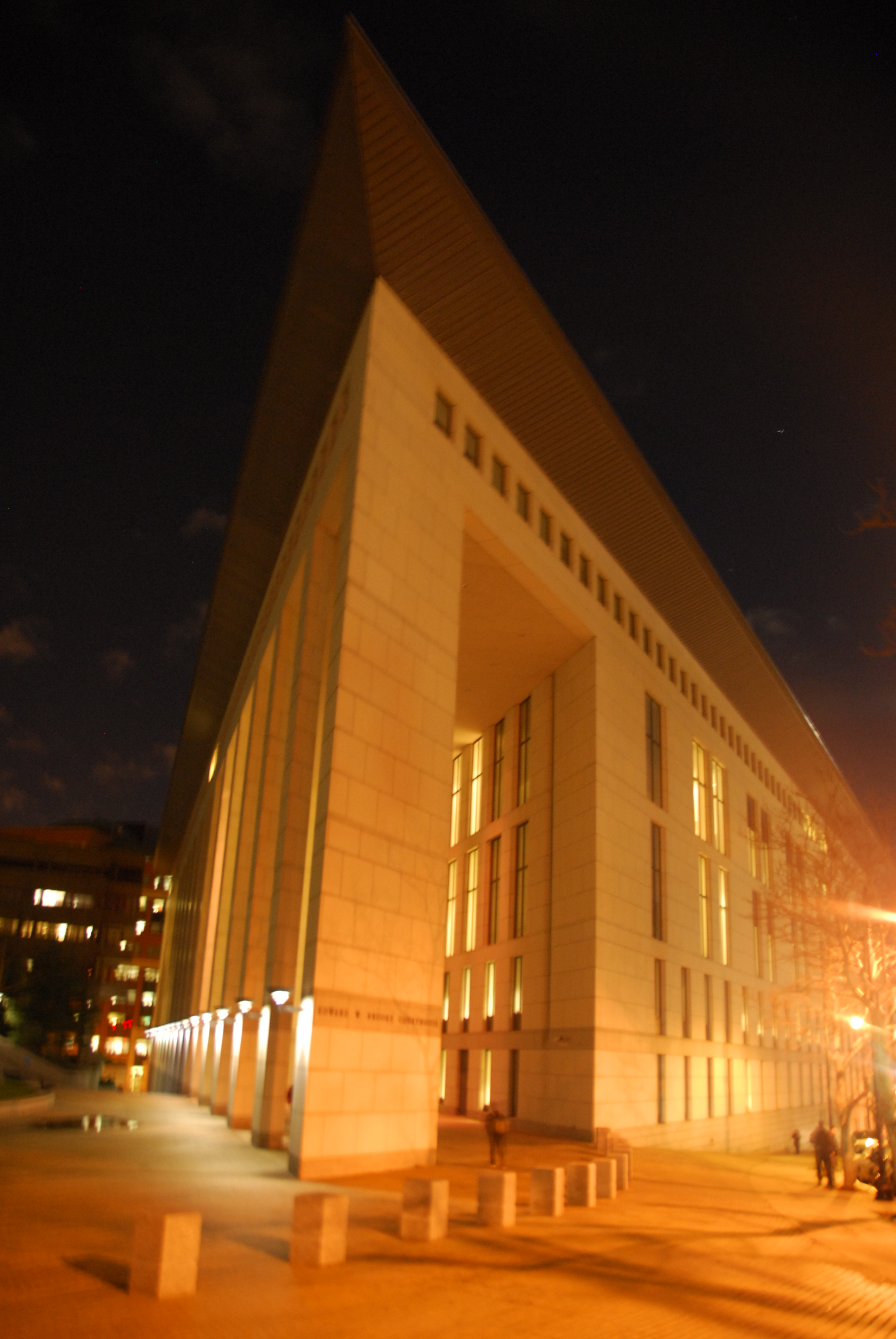 Boston